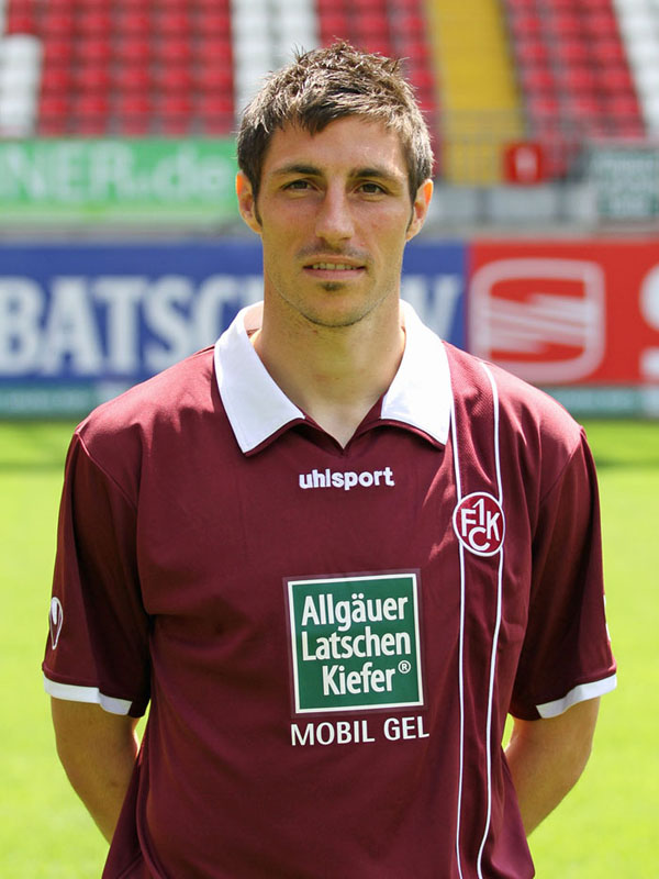 Mathias Abel, Fußballspieler